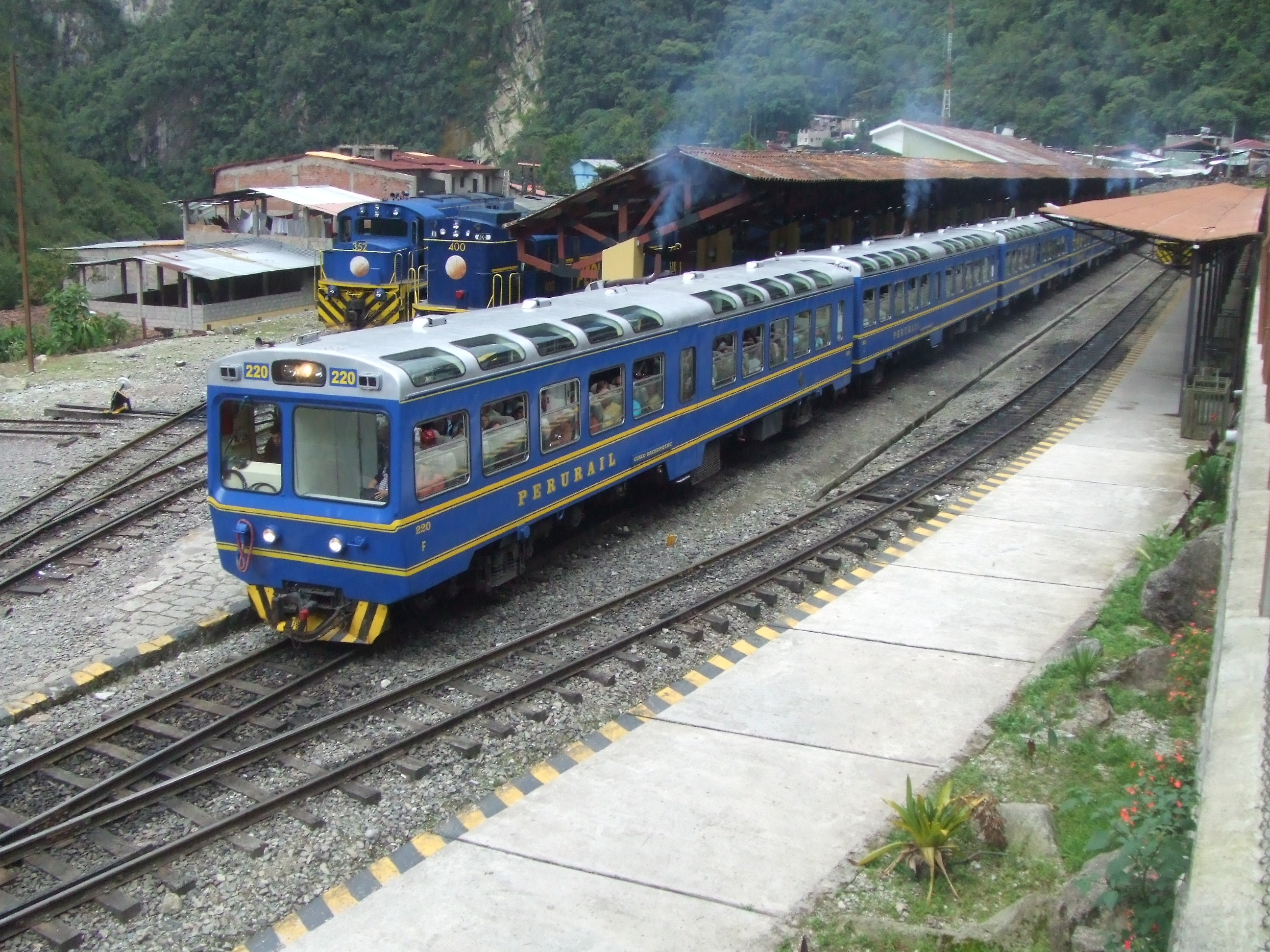 Peru Rail 3' gauge Macosa dmu No.220 departs Aguas Calientes on a service for Ollantaytambo, 10/07.